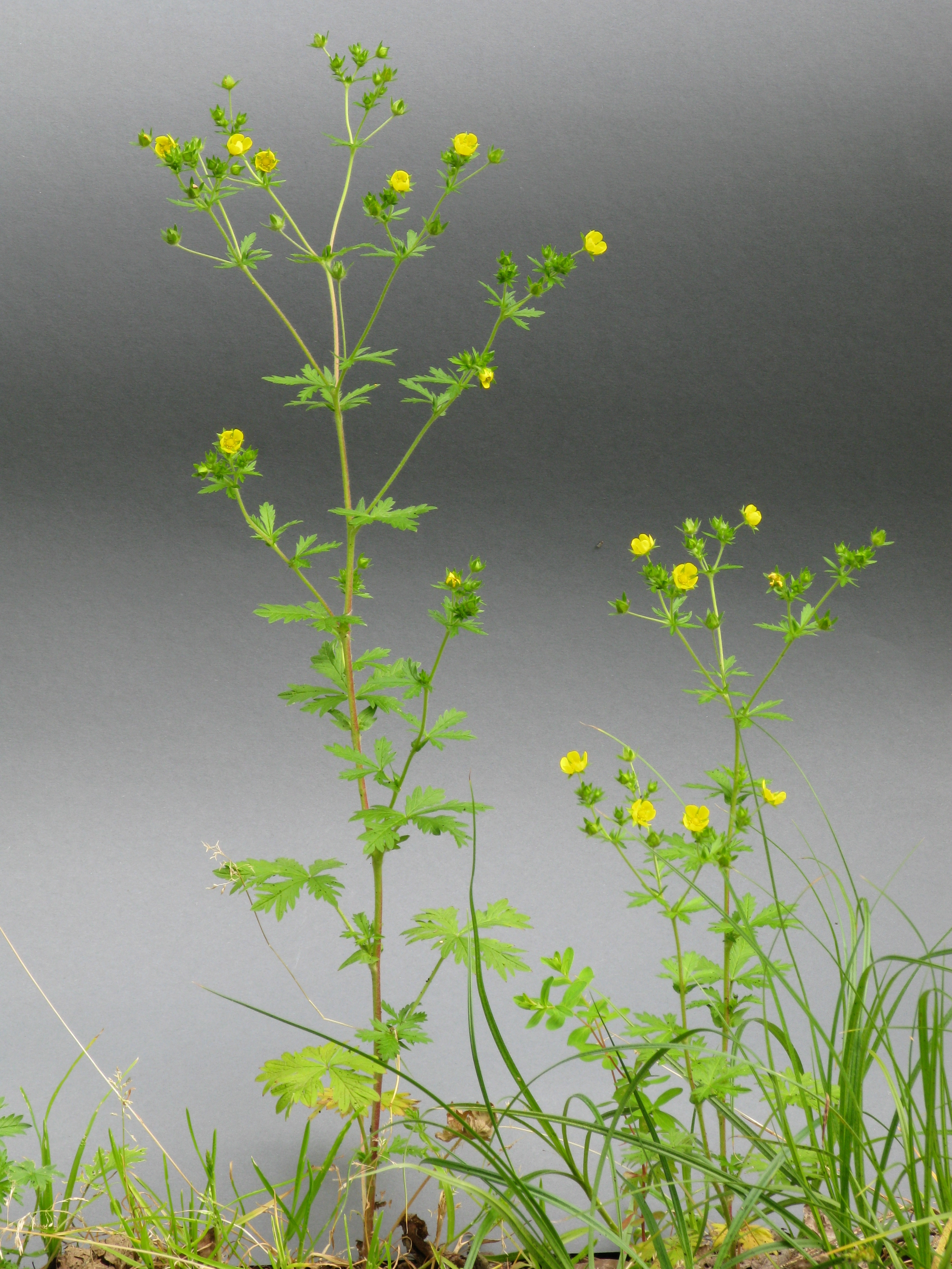 Silber-Fingerkraut, am ähnlichsten. Germany